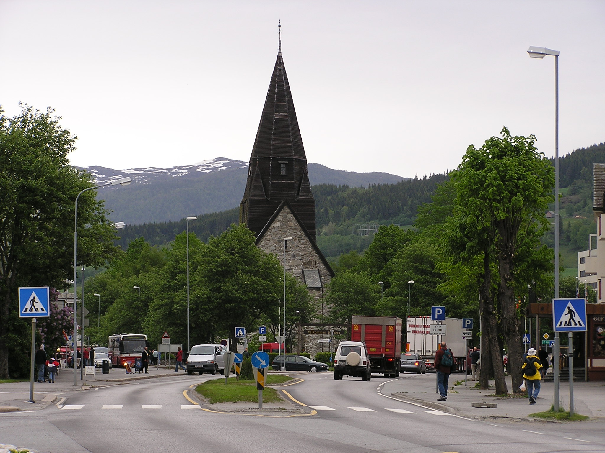 Zicht op een straat in het centrum van Voss met de kerk van Voss, P6080172